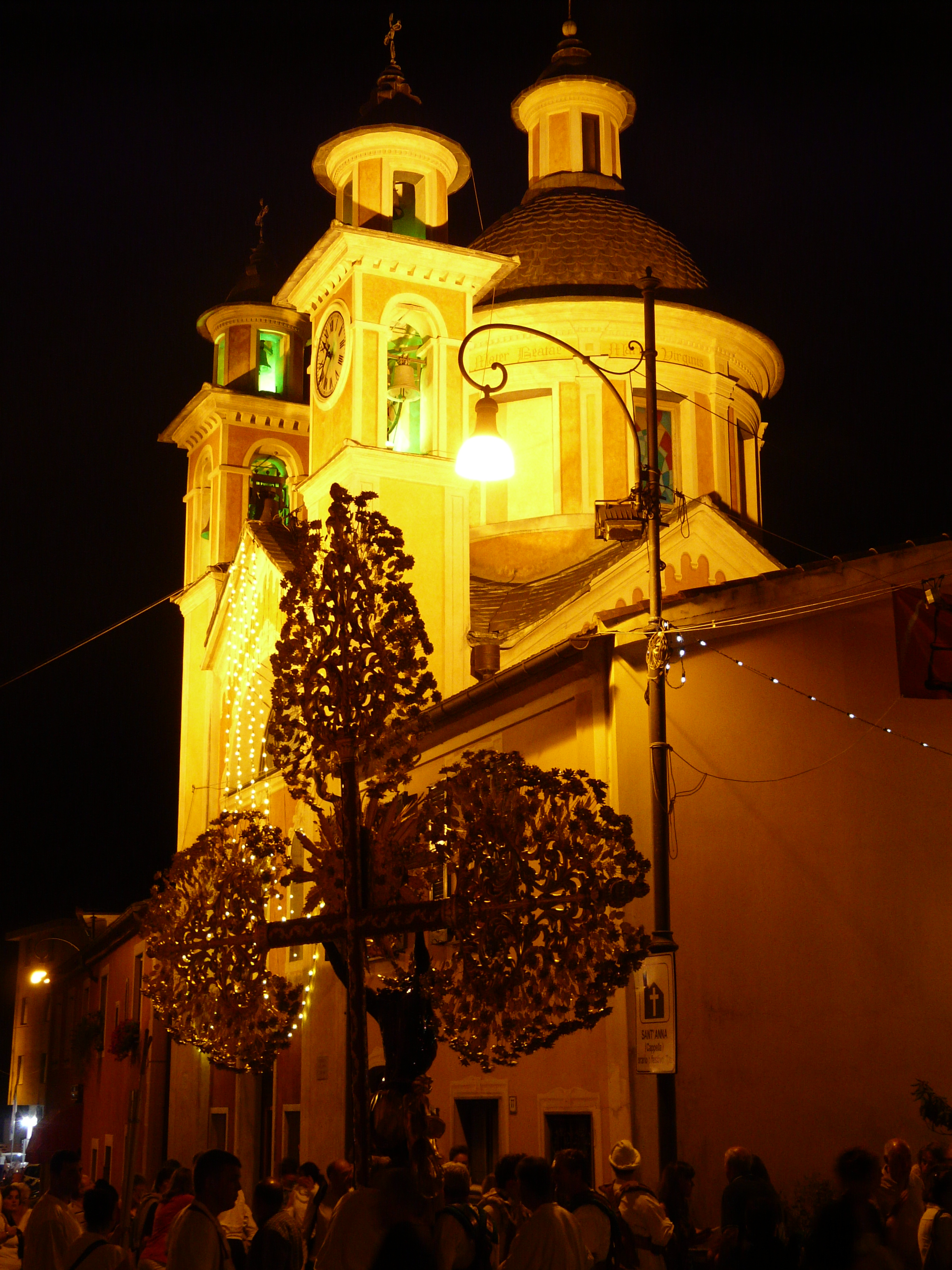 La chiesetta di Sant'Anna, illuminata in occasione delle festività patronali del 26 luglio 2012. Quartiere di Sant'Anna, Rapallo, Liguria, Italia